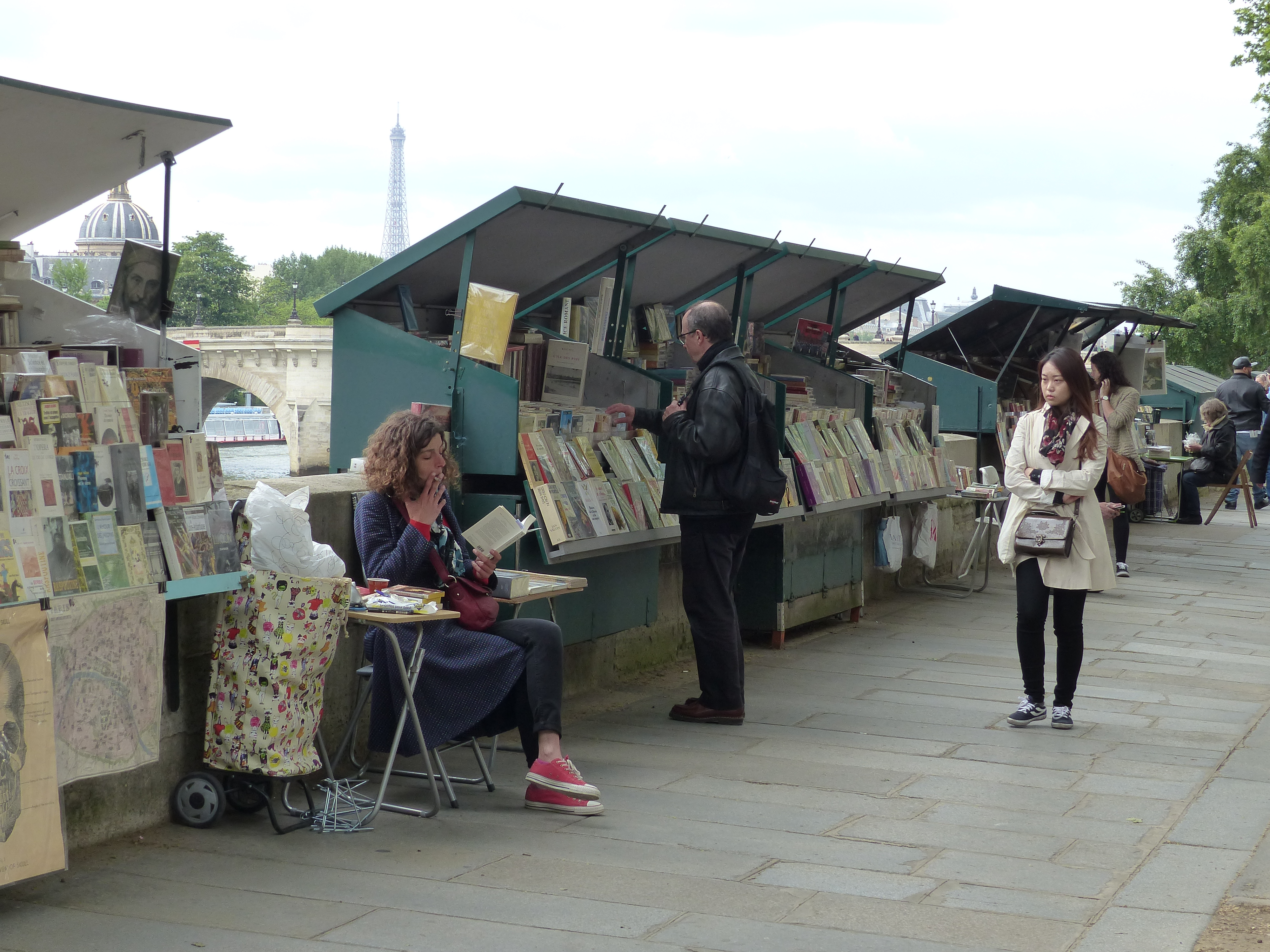 Árusok a Pont Neuf-nél. Párizs, Franciaország. A felvétel 2016. május 15-én készült.